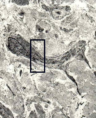 Miofibroblasto observado con MET. Se observa el cuerpo alargado con prolongaciones citoplasmáticas gruesas, que se introducen en el estroma circundante. El núcleo alargado y electro-denso con nucléolo central y cromatina periférica, es visible en el extremo izquierdo del cuerpo celular. A mayor aumento se observan mitocondrias y fibras mioides.